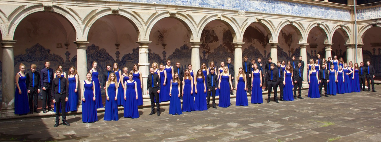 Der Neue Kammerchor Heidenheim während seiner Konzertreise d